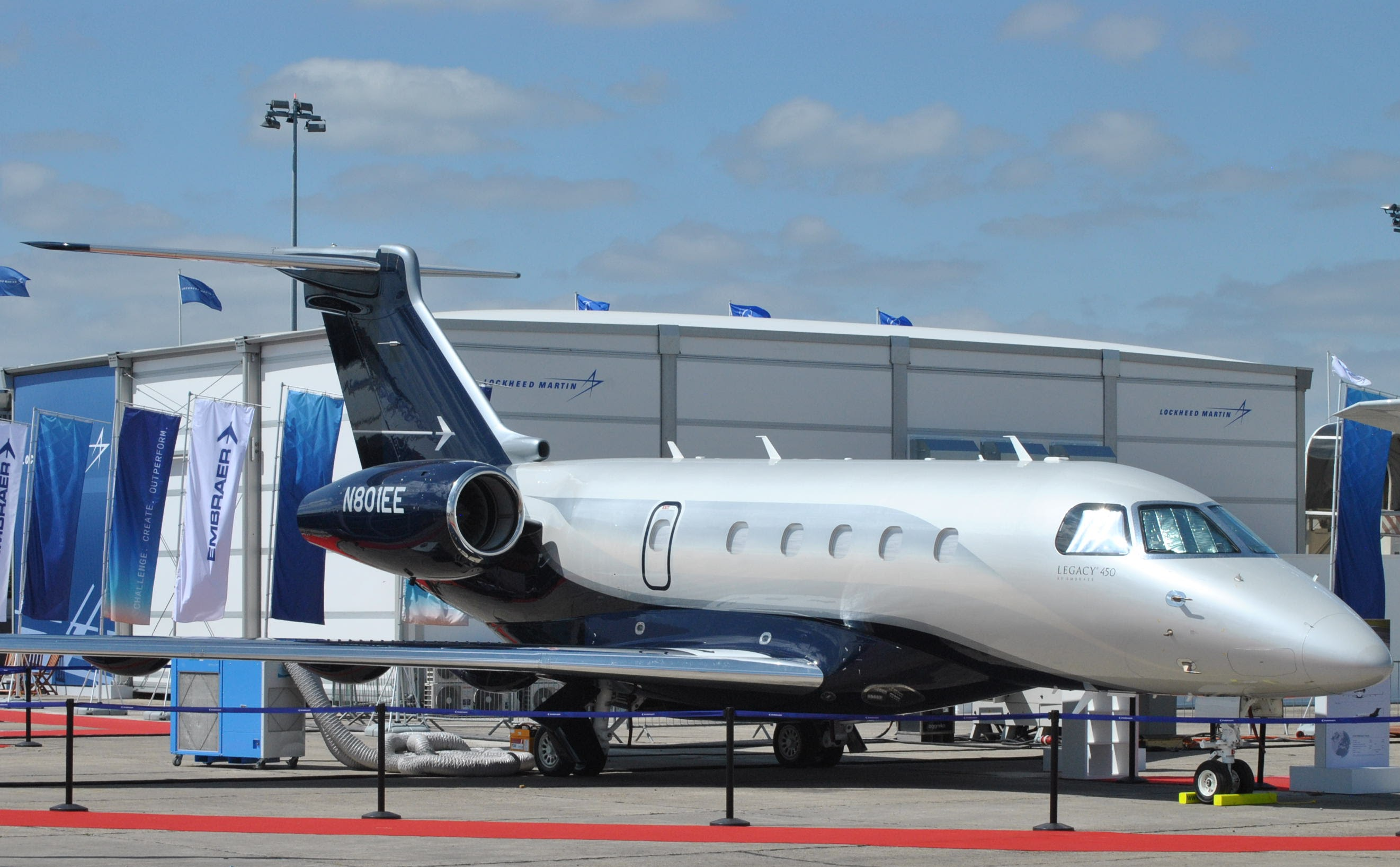 Paris Air Show 2017 Embraer Legacy 450